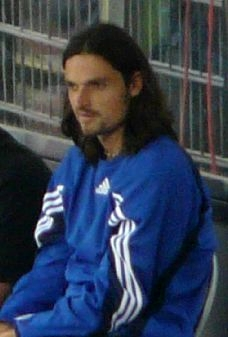 Lutz Pfannenstiel beim Spiel FC St.Pauli gegen Kuba